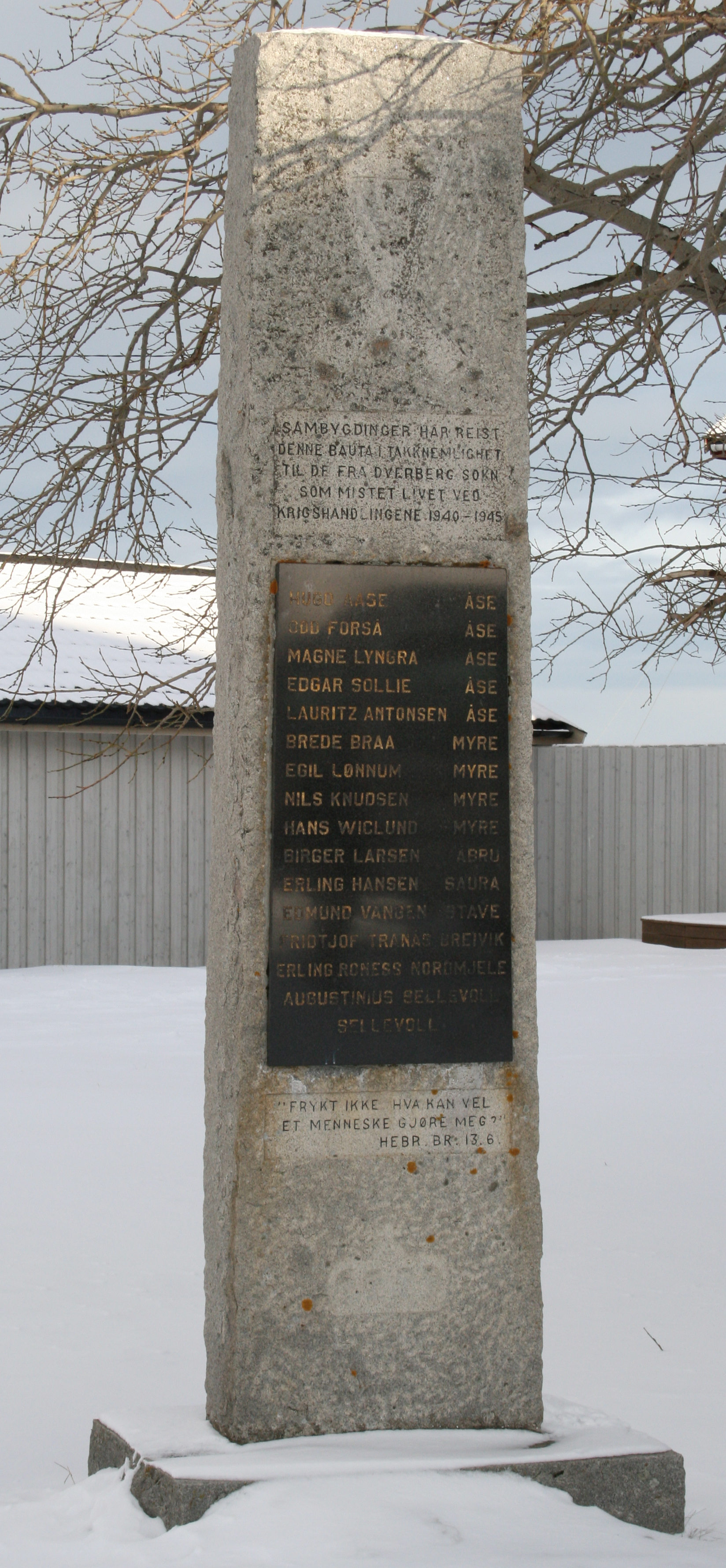 Minnesmerke over falne fra Dverberg sokn 1940–45